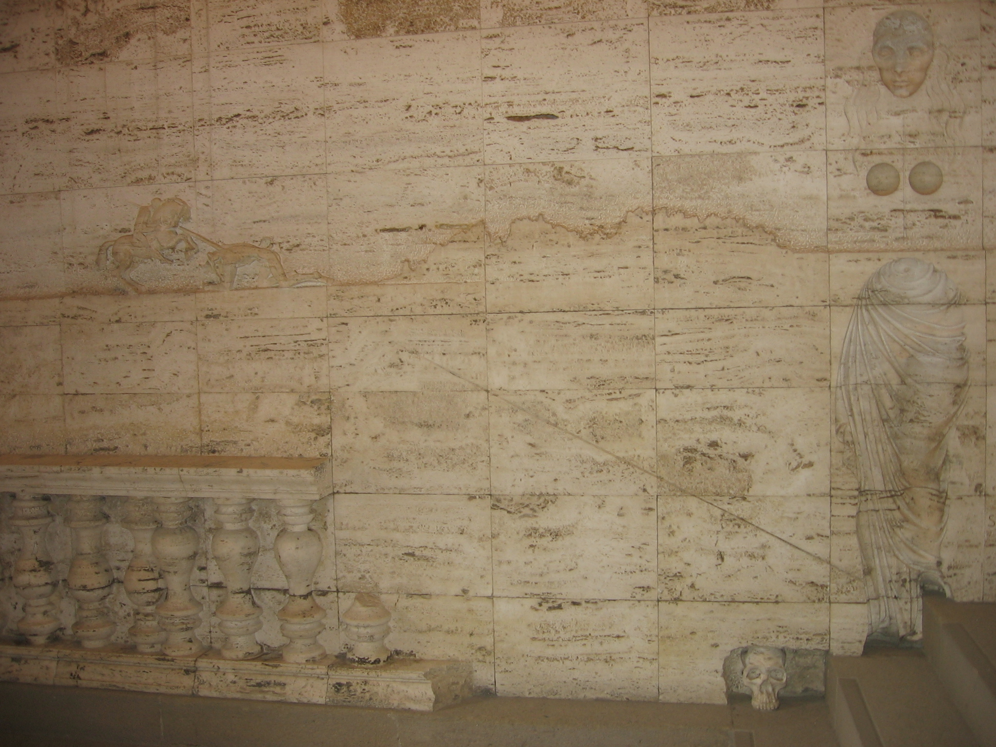 Relieve de San Jorge-Teseo, de Josep Maria Subirachs, Palacio de la Generalidad de Cataluña.